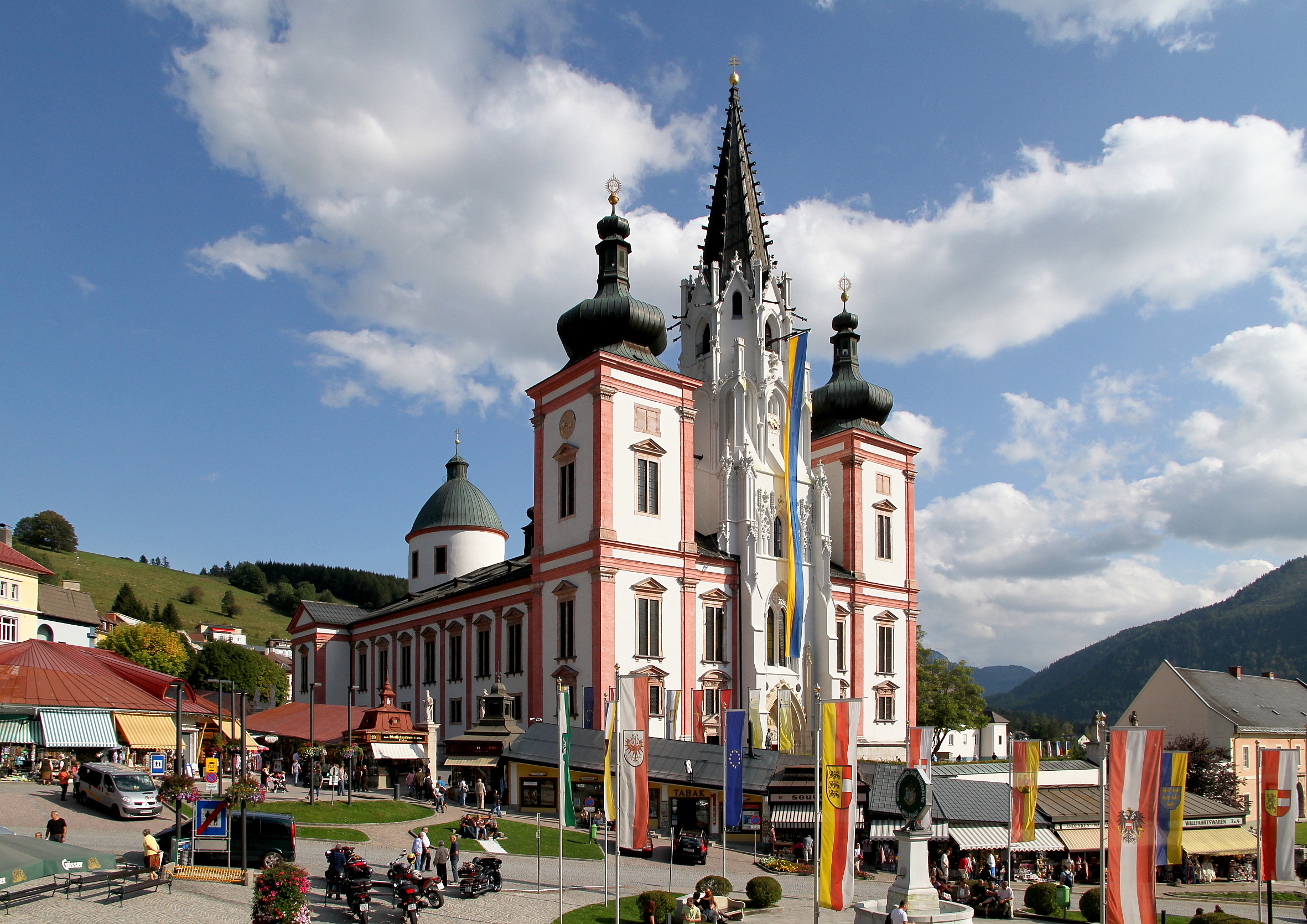 Die Nordwestansicht der Basilika, Pfarr- und Wallfahrtskirche Maria Geburt in der obersteirischen Stadt Mariazell.